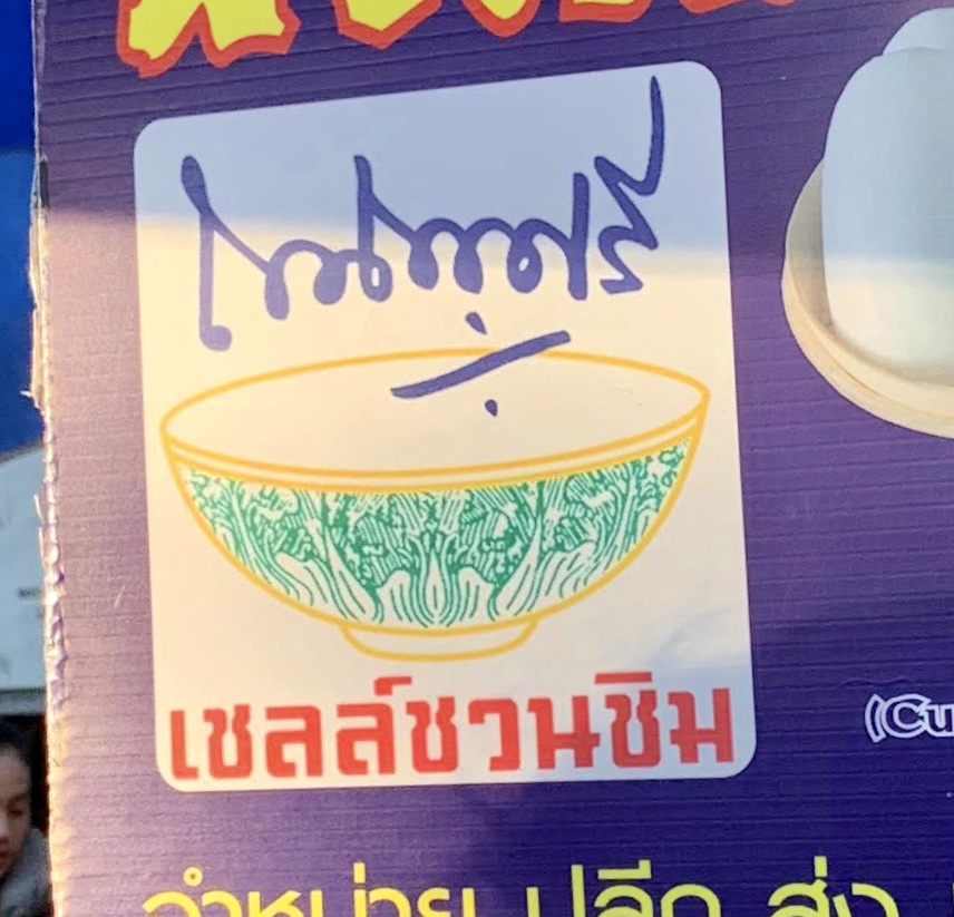 ตราชามและลายเซ็นต์ของหม่อมถนัดศรี ตราของเชลล์ชวนขิม บนป้ายร้าอาหารข้างทางแห่งหนึ่งในจังหวัดเชียงใหม่